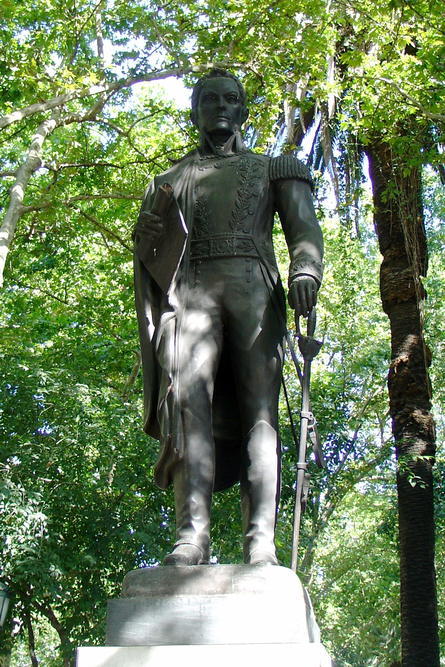 Statue de Simón_Bolívar. Avenue de la Liberté, Lisbonne (Portugal)